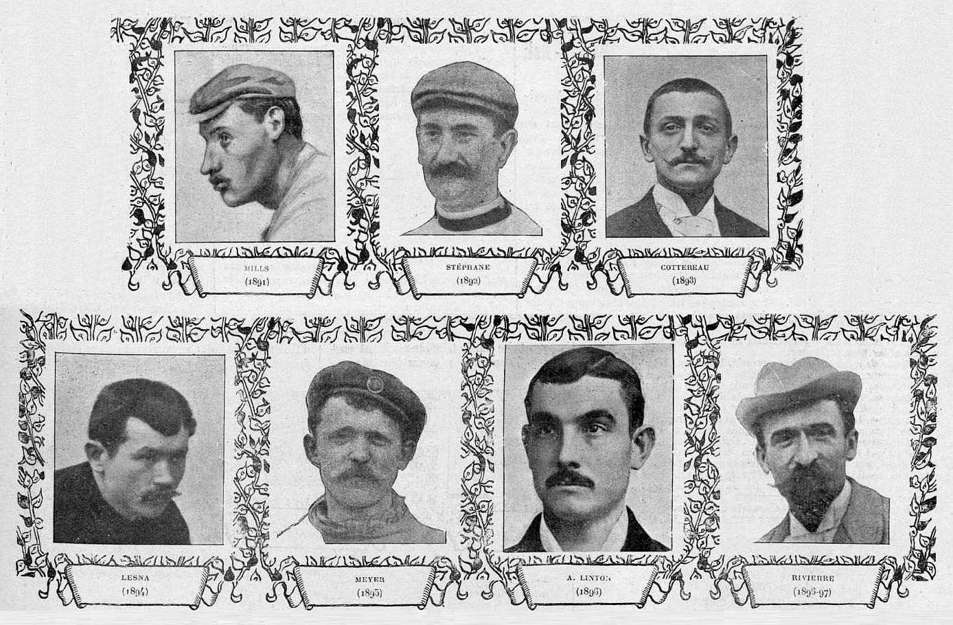 Les vainqueurs de Bordeaux-Paris jusqu'en 1897: Mills (1891); Stéphane (1892); Cottereau (1893); Lesna (1894); Meyer (1895); A. Linton (1896); Rivierre (1896-97)